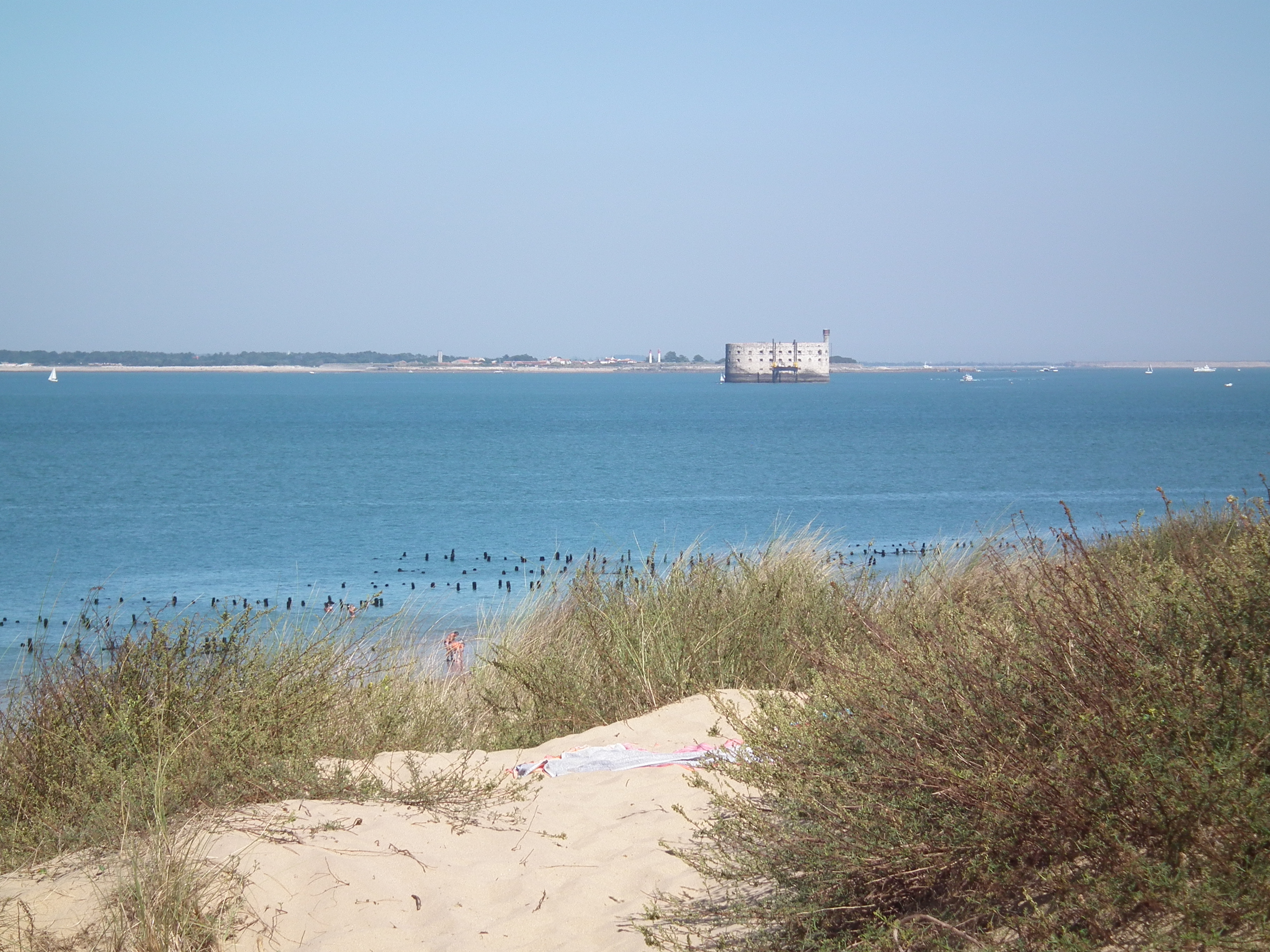 Fort Boyard depuis la plage des Saumonards